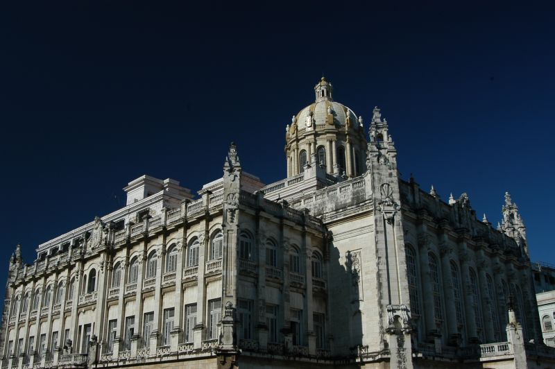 Cuba, sept 2005, info in de Metadata